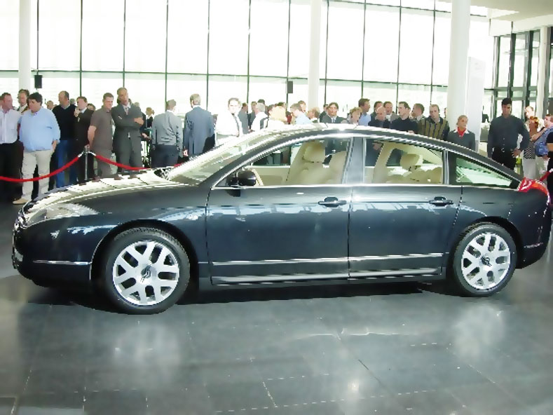 Citroen Model C6